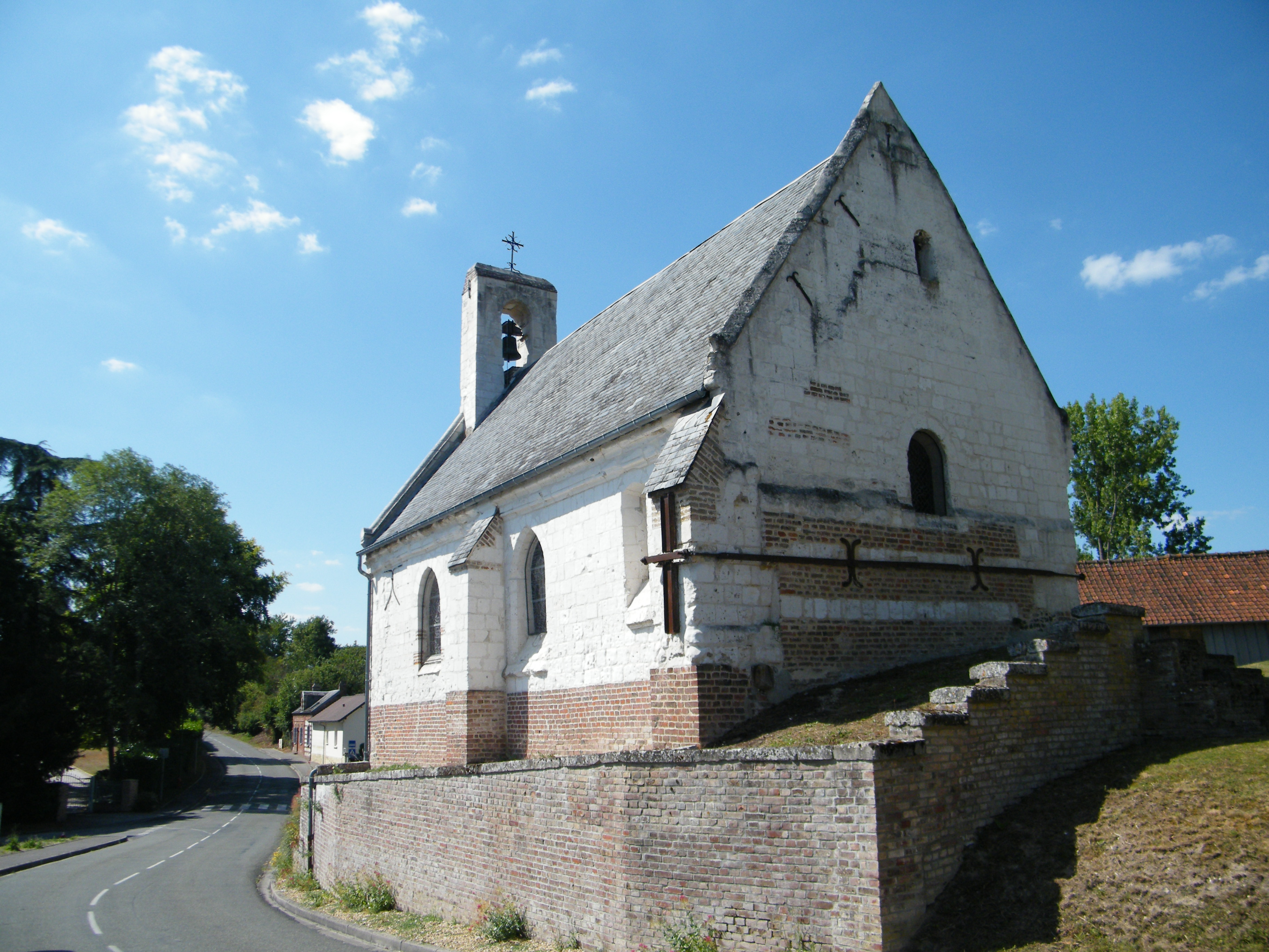 Coquerel, Longuet, (Somme), chapelle Saint-Julien.